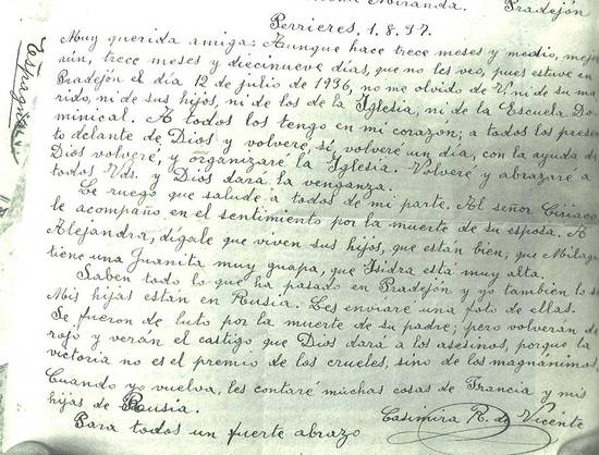 Carta de Casimira Rivas, viuda del pastor protestante Simón Vicente, desde el exilio en 1937.